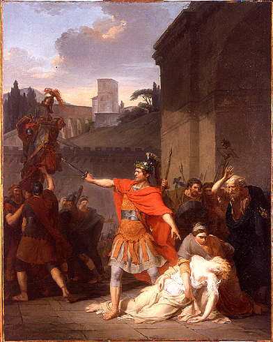 Victor-Maximilien Potain, Horace tue sa soeur Camille, 1785, Paris, Ecole Nationale Supérieure des Beaux-Arts